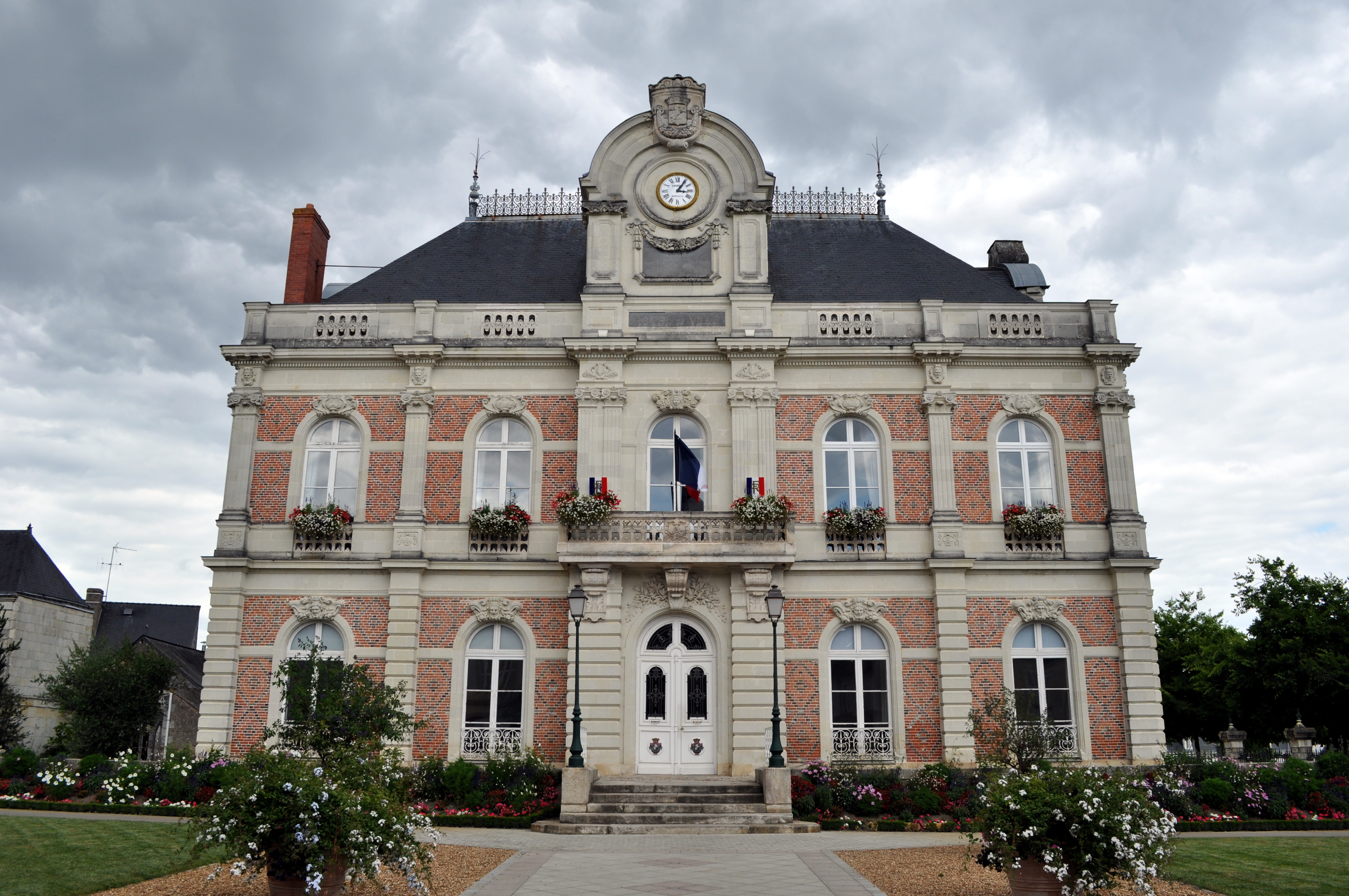 Mairie de Beaufort-en-Vallée (Maine-et-Loire, France).